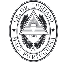 Grêmio Lusitano